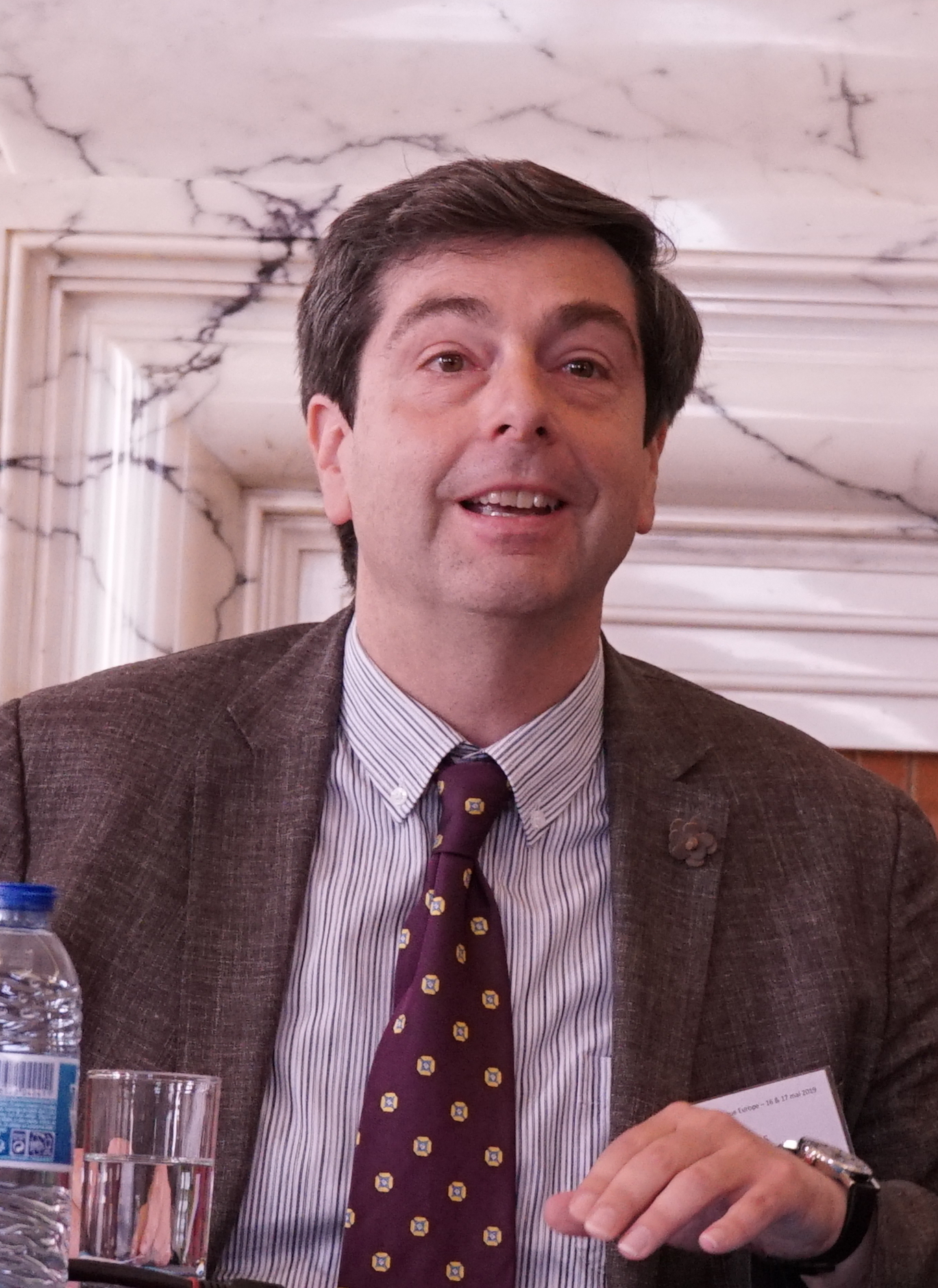 colloque sur l'europe à Reims.